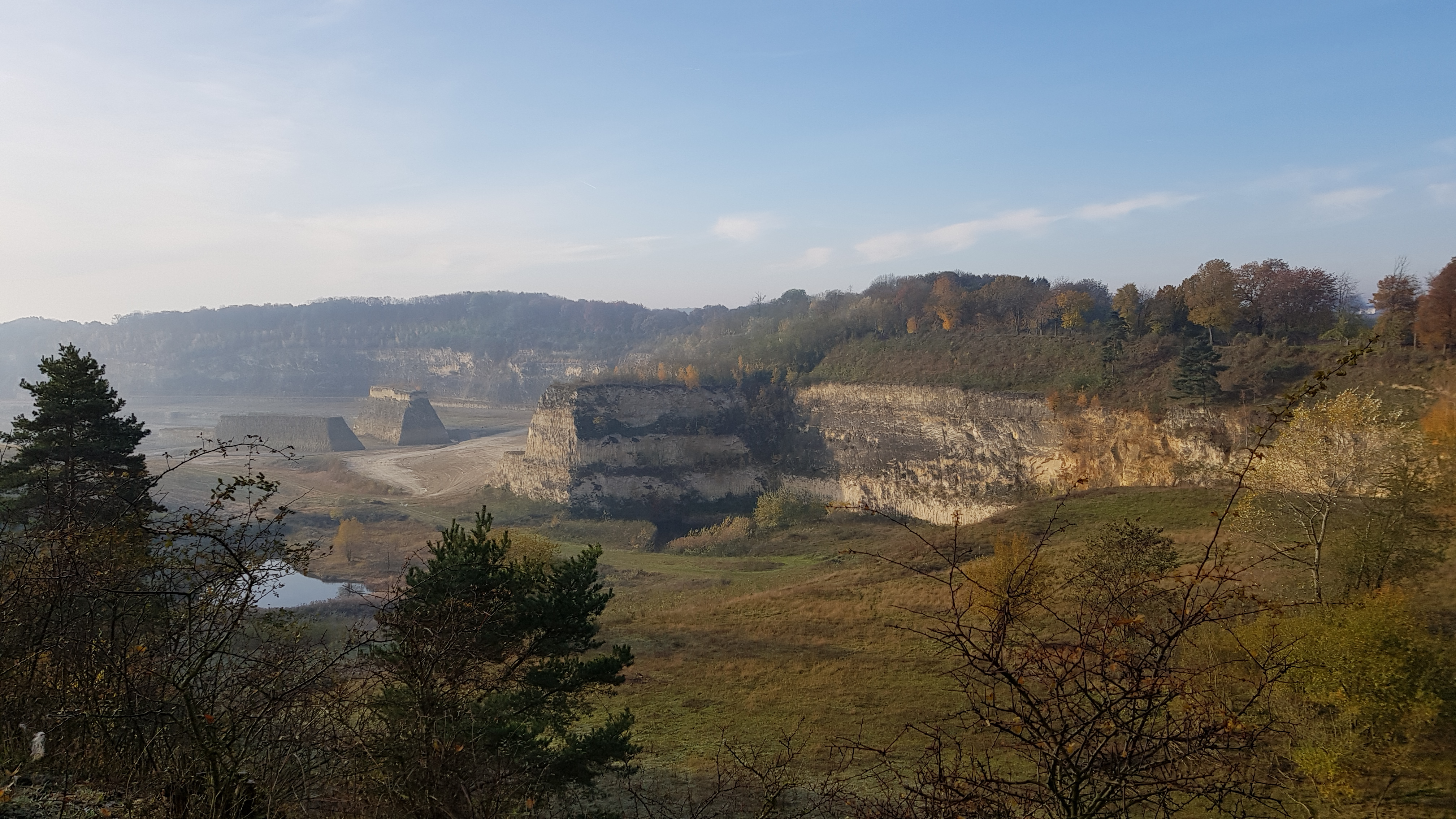 Oehoevallei op de Sint-Pietersberg, Maastricht, Nederland